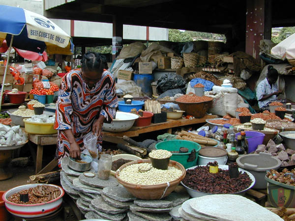 Market Mfoundi , Yaoundé, Cameroon. From fr.wikipedia. dl'a'dlv alvallavadvad'v